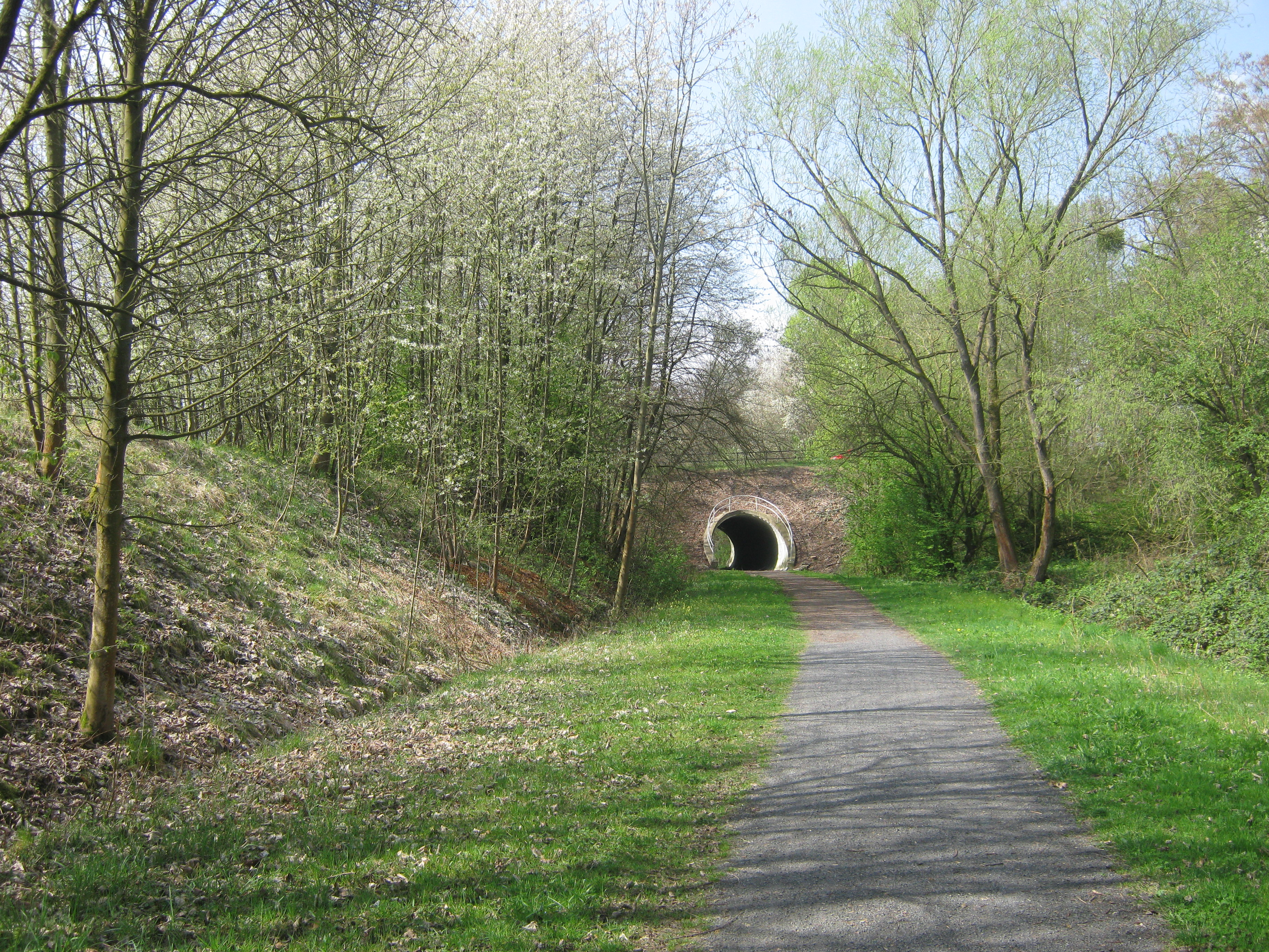 Dransfelder Rampe, stillgelegter Abschnitt Göttingen - Hann. Münden über Dransfeld der Hannöverschen Südbahn. Zufahrt von Osten auf die (neu geschaffene) Tunnelunterführung unter dem Hetjershäuser Weg auf Höhe Mittelbergschule.